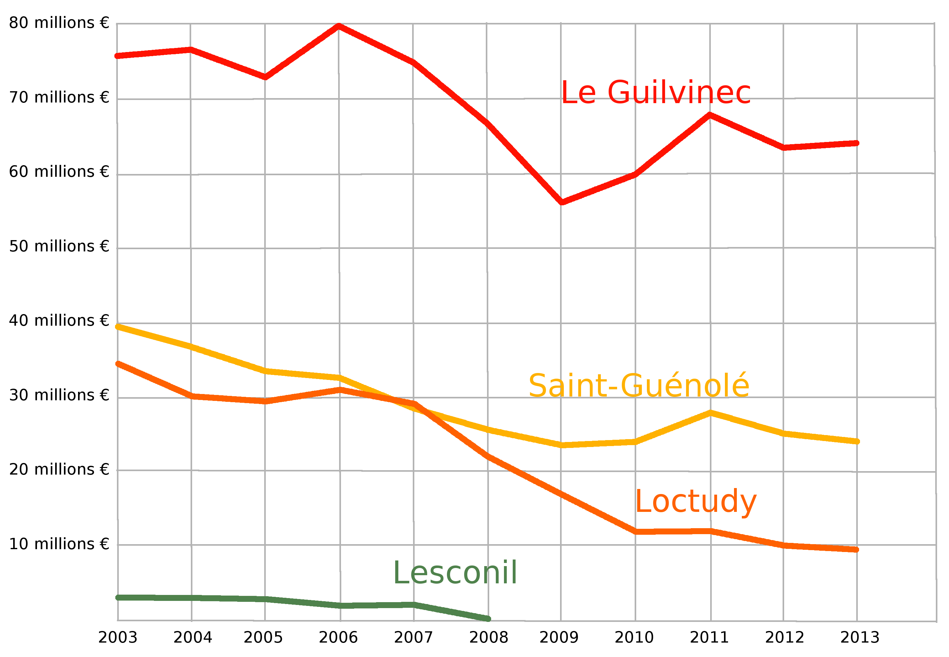 Évolution de la valeur des ventes déclarées par les bateaux français en halle à marée de 2003 à 2012 (source : FranceAgriMer, « Évolution de la valeur des ventes déclarées en halle à marée de 2003 à 2012 », Données de vente déclarées en halles à marée en 2012, avril 2013, p. 86). Leurs chiffres sont en euros 2012, je les ai convertis en euros 2013. Et j'ai ajouté les valeurs 2013 (source : FranceAgriMer, « Ventes déclarées par les bateaux français en halles à marée en 2013 », Les filières pêche et aquaculture en France, avril 2014, p. 8).